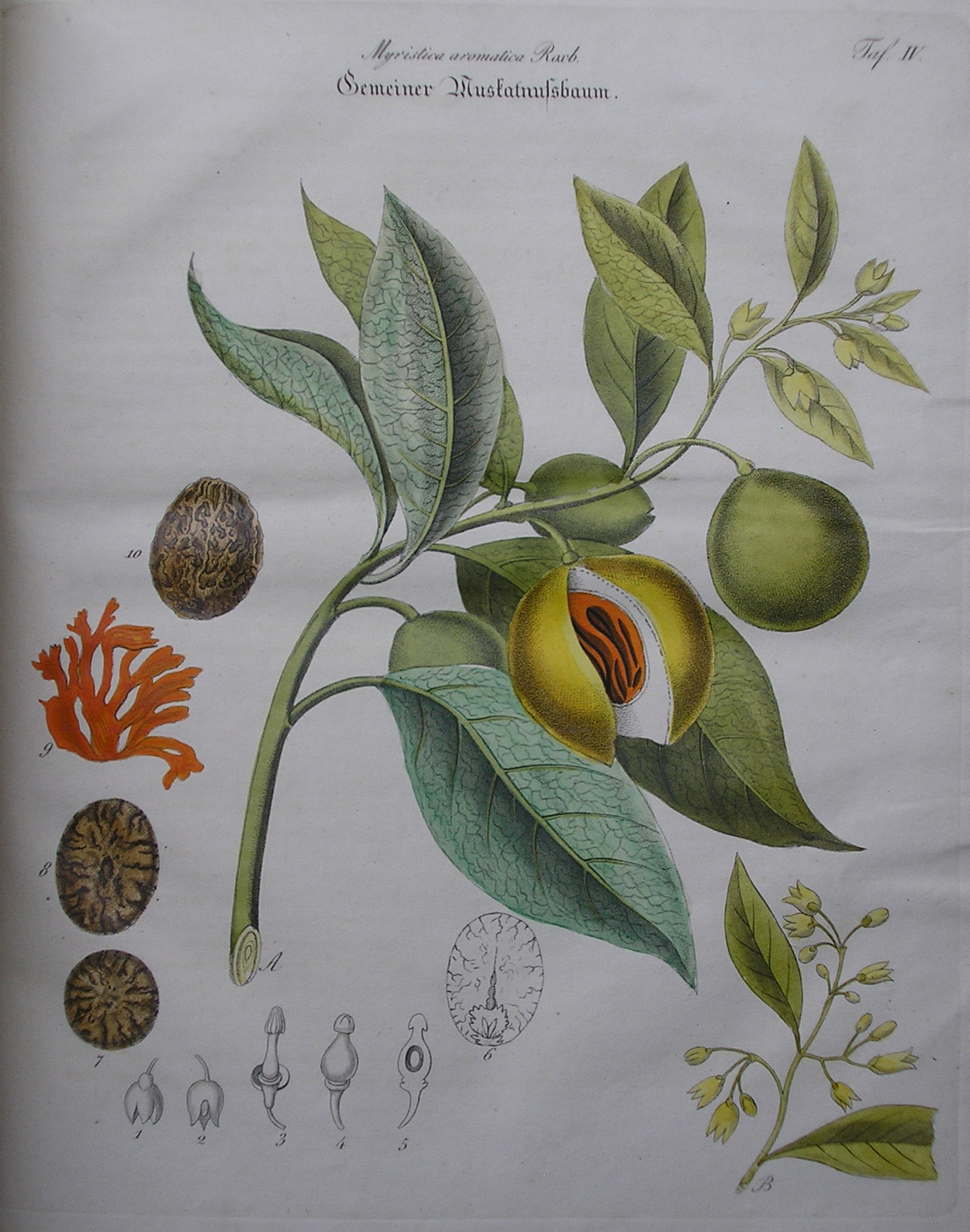 Muskanussbaum (aus Zenker: Merkantilische Waarenkunde oder Naturgeschichte der vorzüglichsten Handelsartikel, 1831)